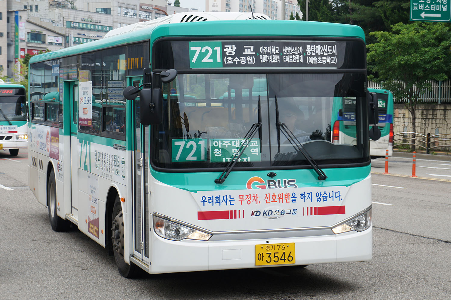 화성여객 721번 대우 new bs106 3546호